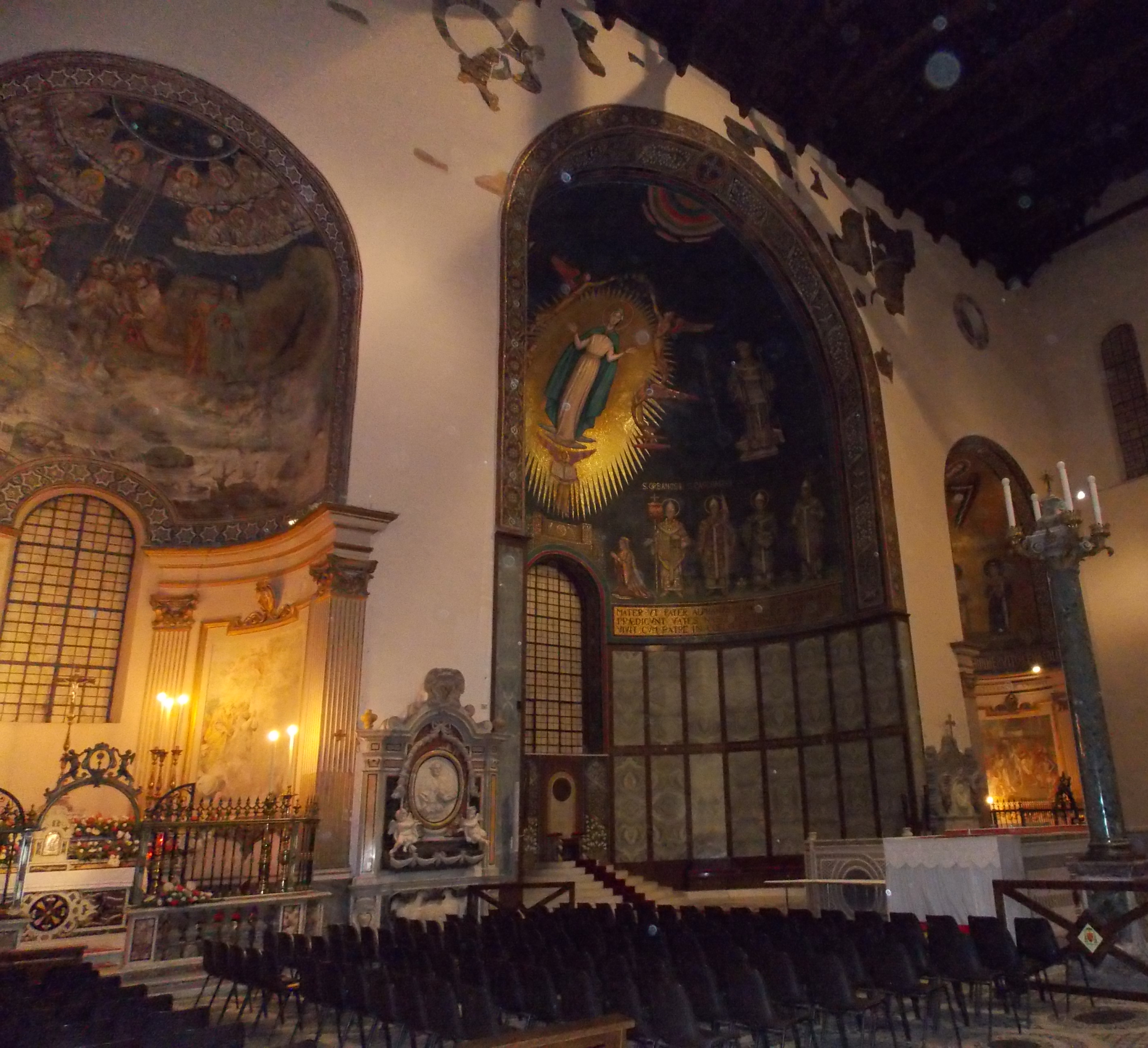 Salerno, Duomo e Cattedrale di San Matteo: interno, absidi.